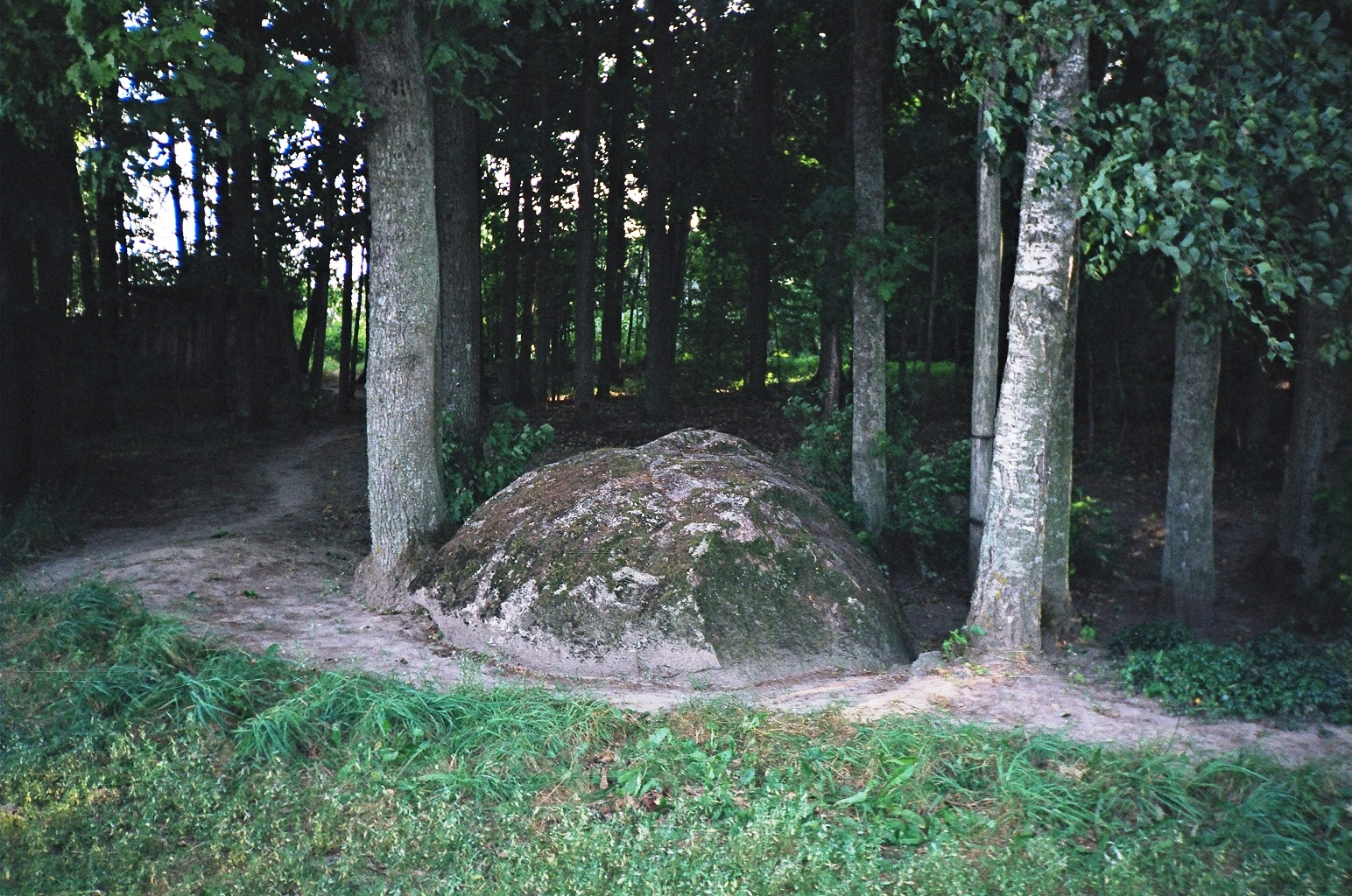 Velnio akmuo